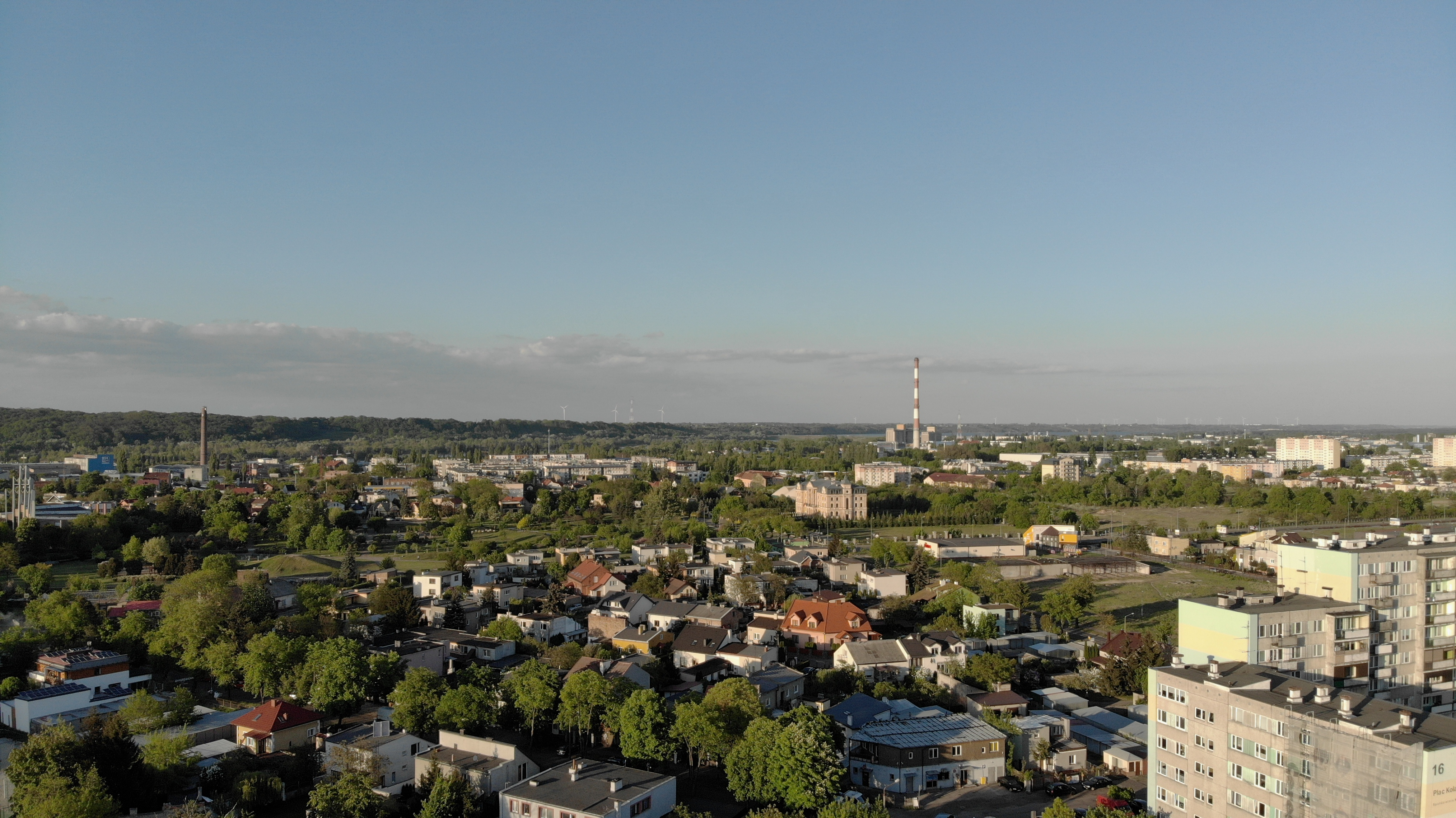 Styk Śródmieścia i Kazimierza Wielkiego (2020 r.)